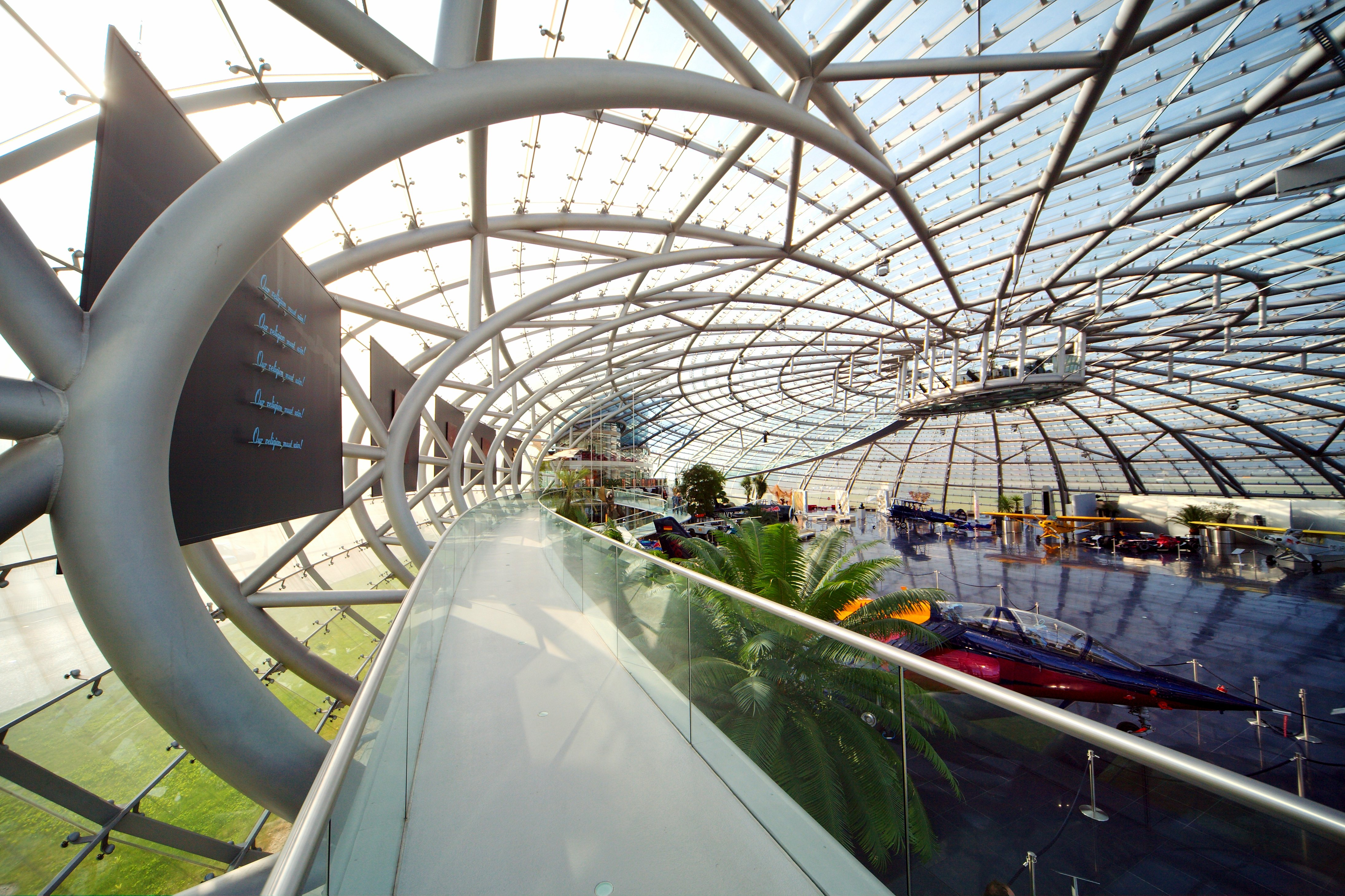 Hangar 7 Flughafen Salzburg